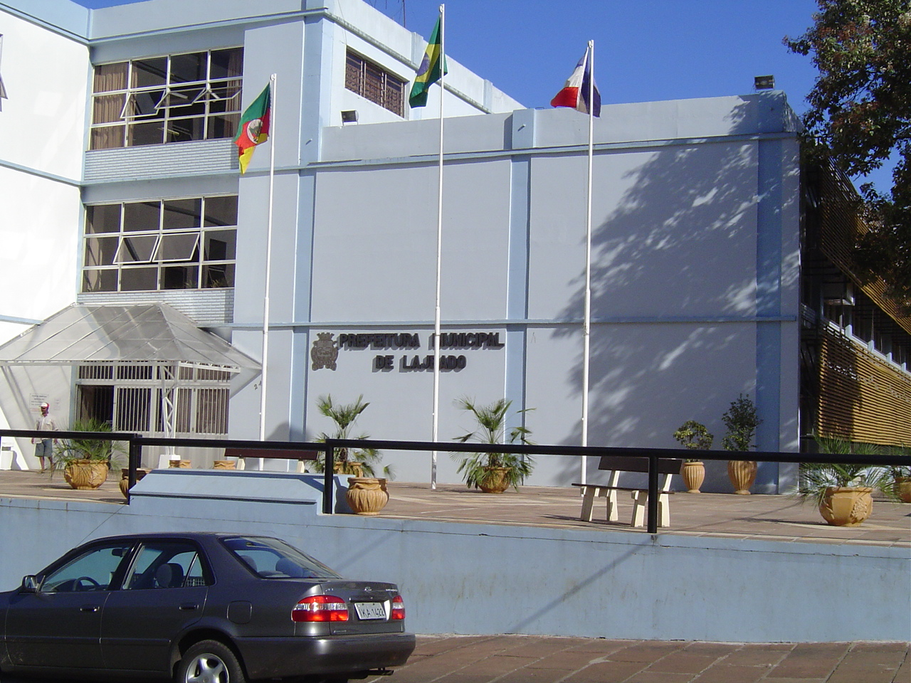 Foto da Prefeitura Municipal. Foto Própria.